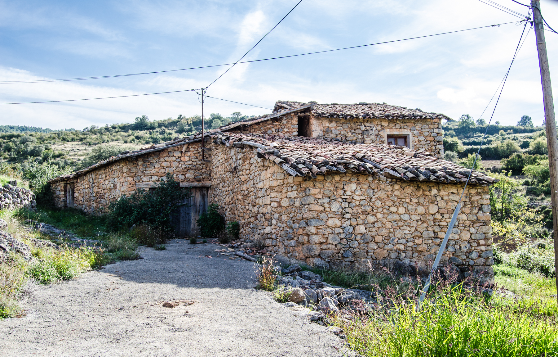 Hortoneda de la Conca. Construcción en piedra seca.